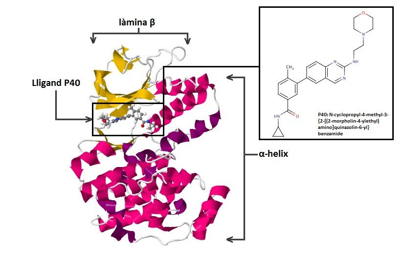 Les p38 MAPK tenen un centre actiu o lligand que s'identifica com a P40. El seu nom és N-cyclopropyl-4-methyl-3-{2-[(2-morpholin-4-ylethyl)amino]quinazolin-6-yl}benzamide i té un pes molecular de 431.530 g/mol. La seva fórmula és: C25 H29 N5 O2. L'estructura secundària de les p38 està formada per un domini α-hèlix i un làmina-β.